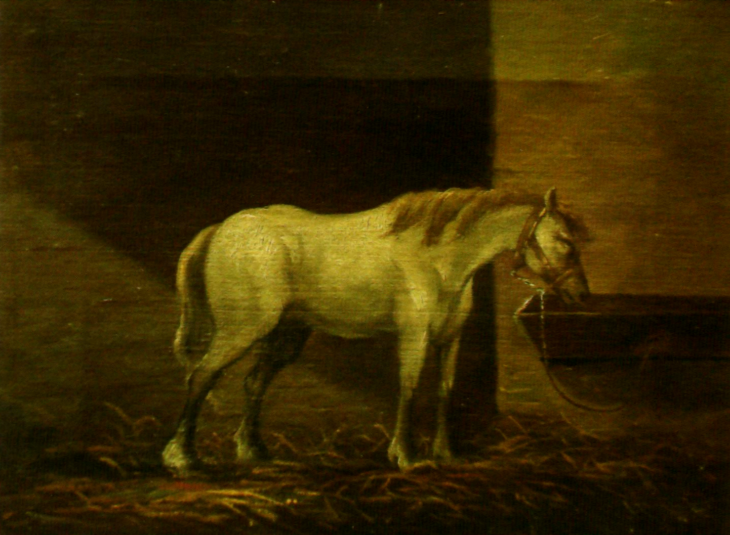 Gheorghe Tattarescu - Cal în grajd, Muzeul Municipiului Bucureşti, 16,3x21,5 cm.